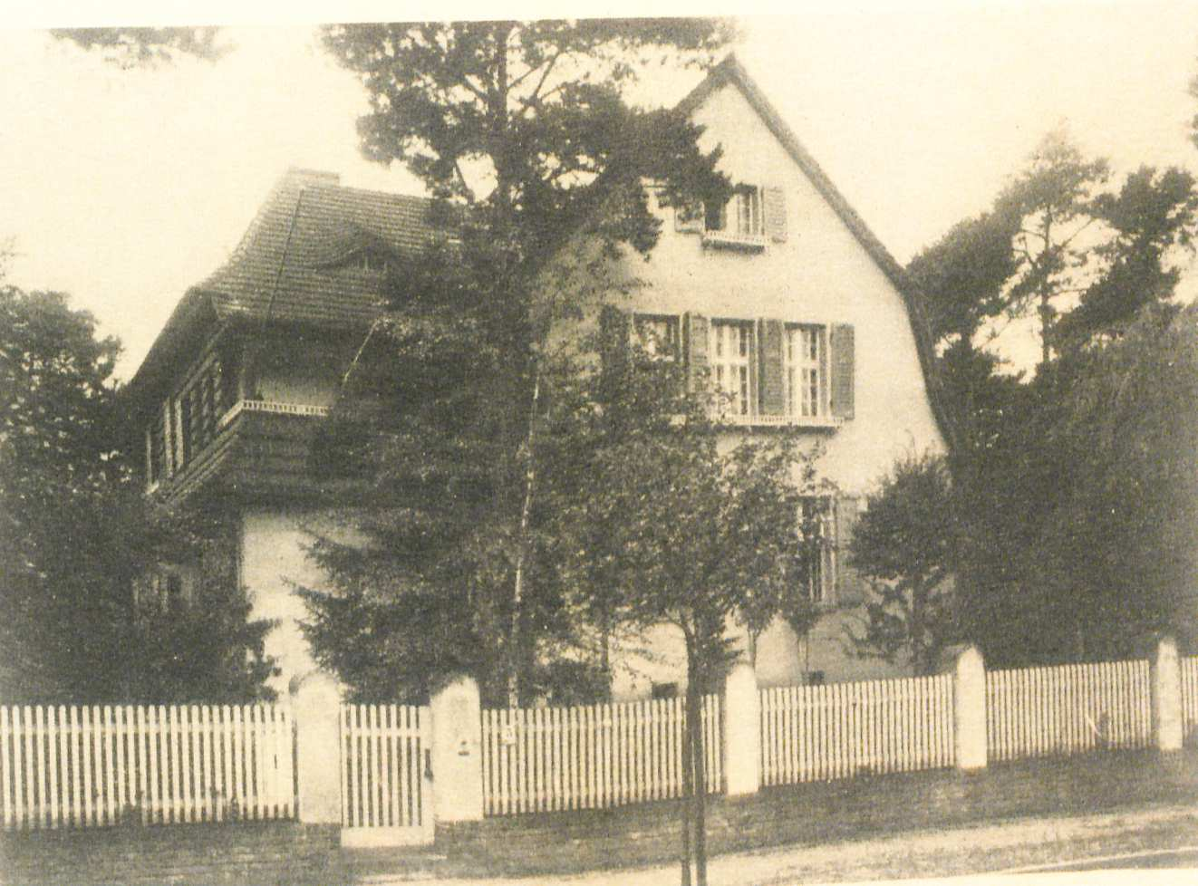 Margarete Behm Haus Lehndorf in Zehlendorf Behms und Wolffs Wohnsitz von 1910 bis 1919